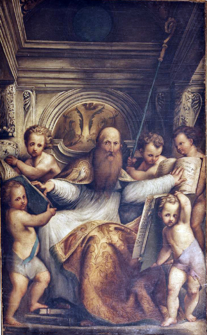 Sant'Agostino d'Ippona in cattedra